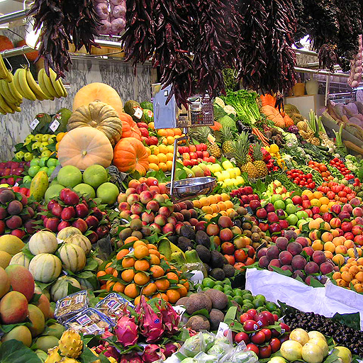 image pour exemple de séparation quadri